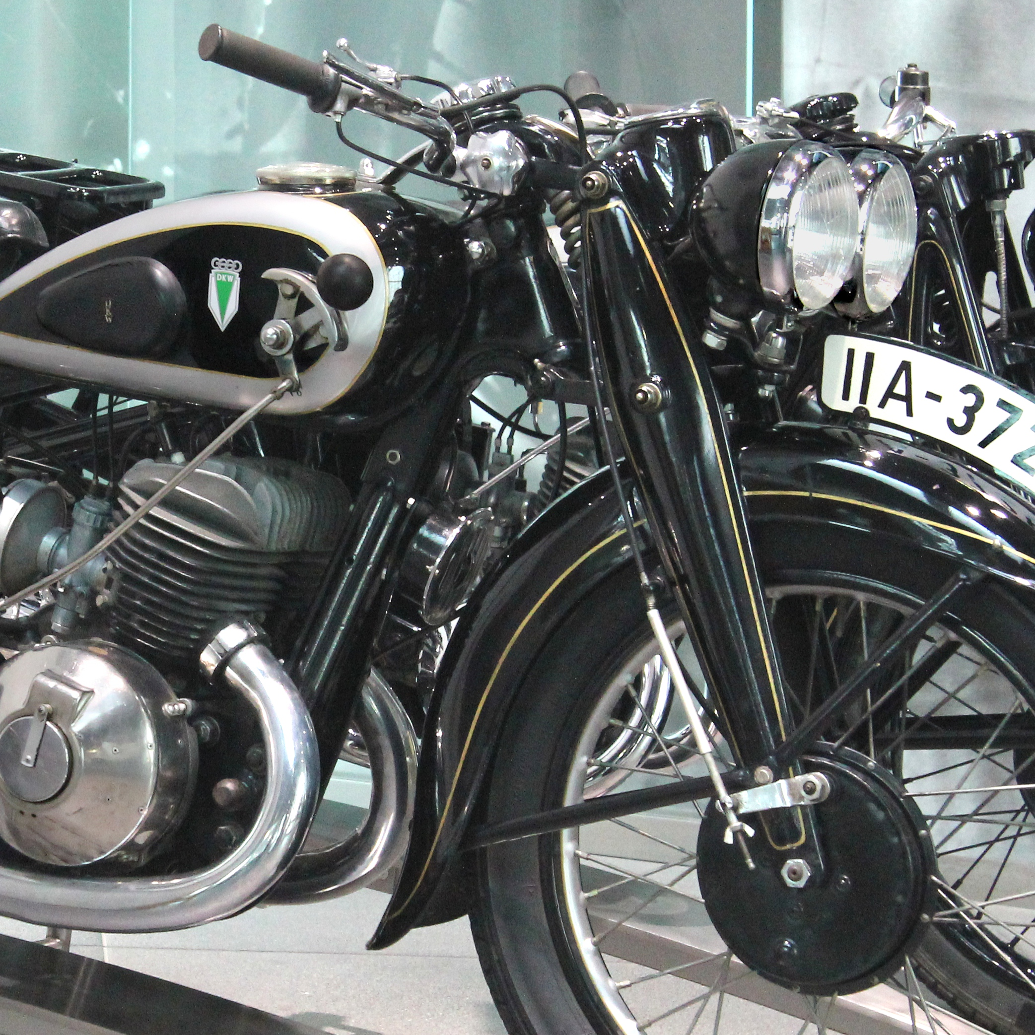 Detail einer DKW SB 500, 2. Serie, Baujahr 1936, im museum mobile in Ingolstadt. Zweizylinder-Zweitaktmotor, 494 cm³, 15 PS bei 4000/min, Höchstgeschwindigkeit 115 km/h; Preis 995,00 RM, 13.300 Stück von 1936 bis 1939 gebaut. Im September 1938 wurde eine Sonderanfertigung mit vergoldetem Tank an den König des Irak ausgeliefert.